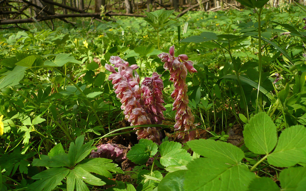 Петров крест — растение старых дубрав. Урочище Стрелица, бассейн реки Корень. Шебекинский район Белгородской области.